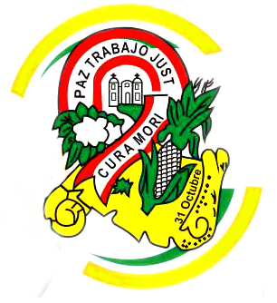 Escudo Cura Mori